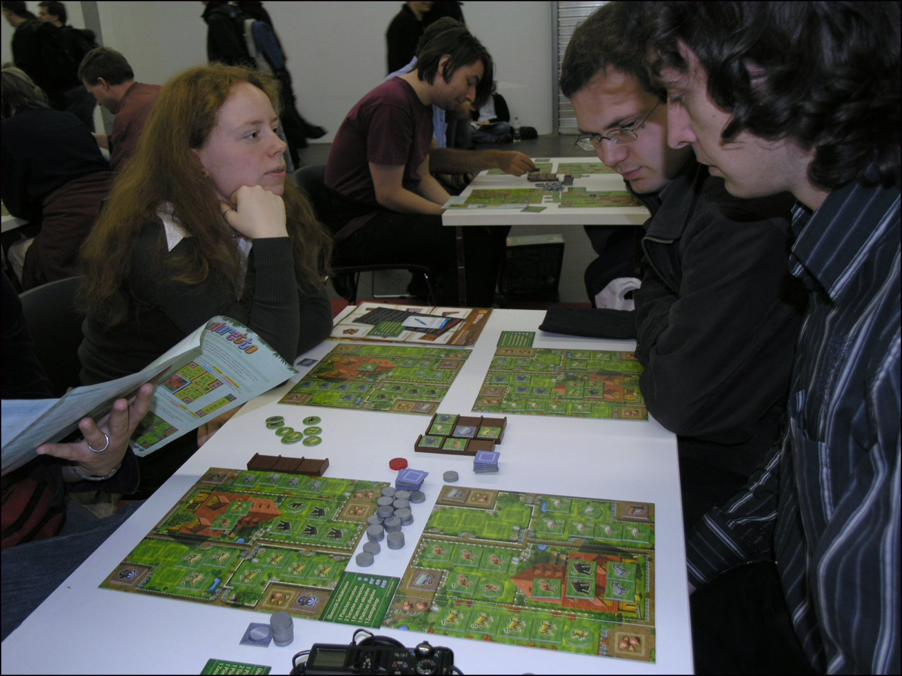 Zooloretto (Essen Spiel'07)